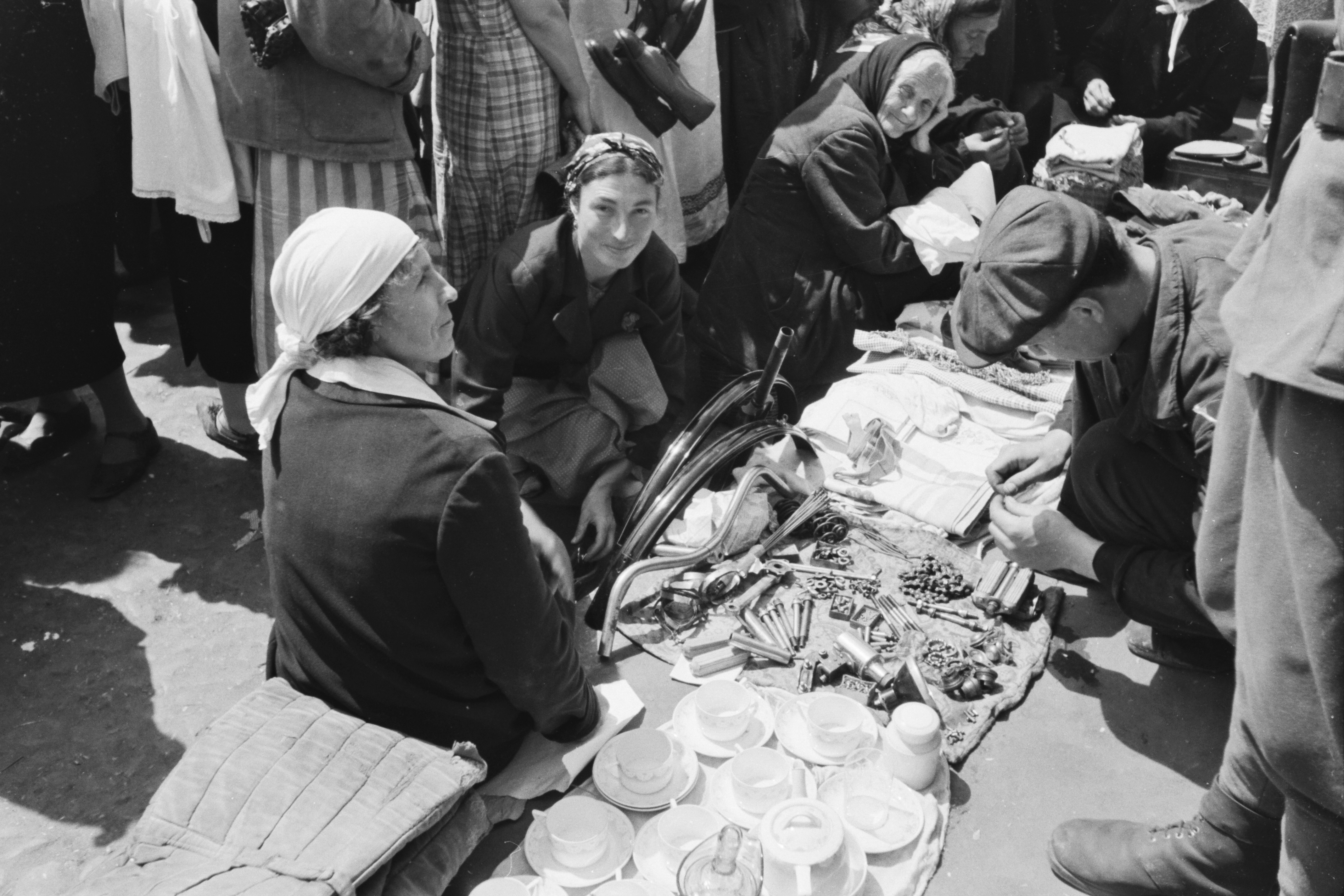 Győzelem tér (ekkor: 1905-ös felkelés tere), piac. Location: Ukraine, Kiev Tags: market, bicycle parts Title: Győzelem tér (ekkor: 1905-ös felkelés tere), piac.